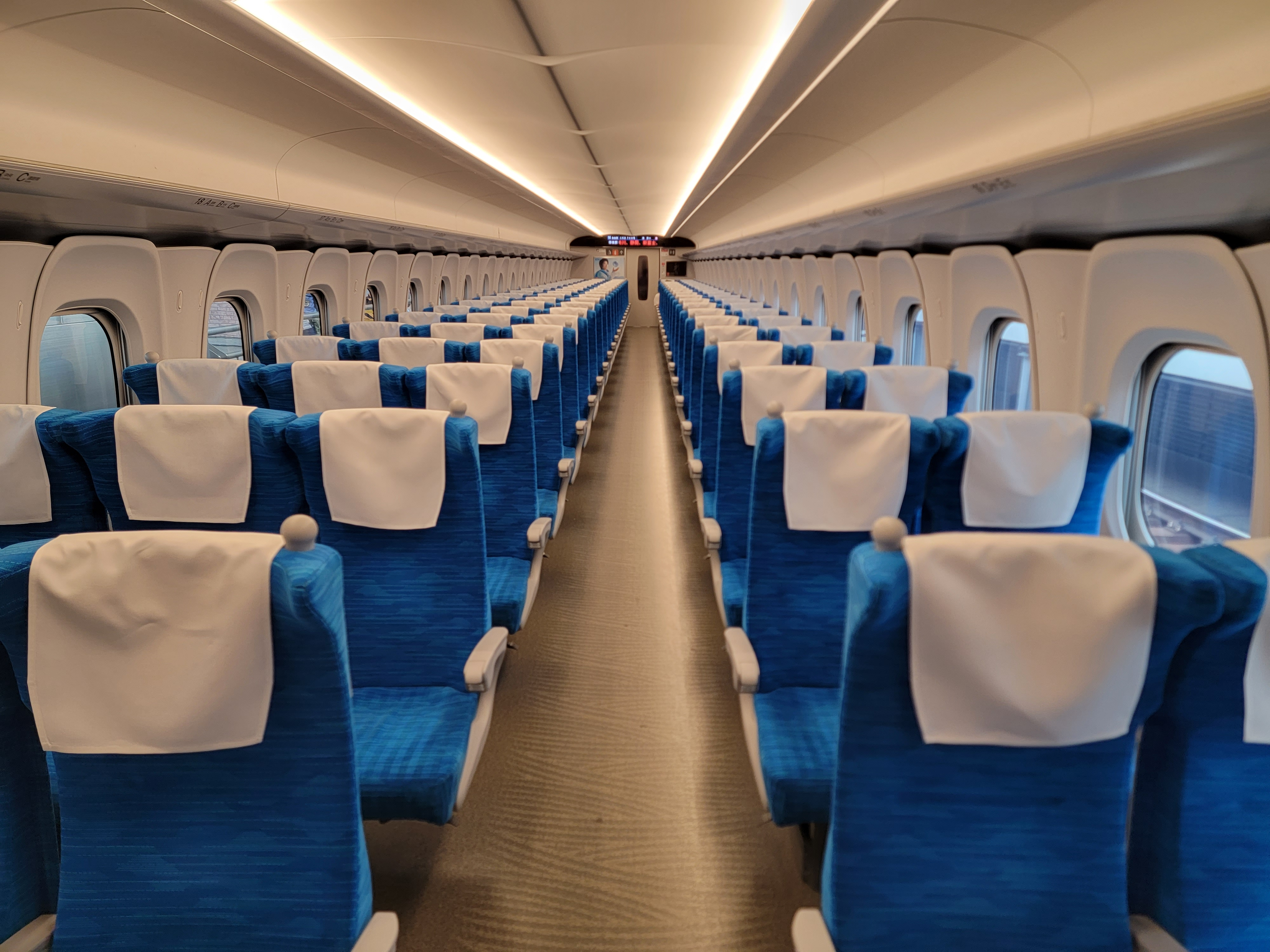 新幹線N700Sの車内(16号車東京方から)